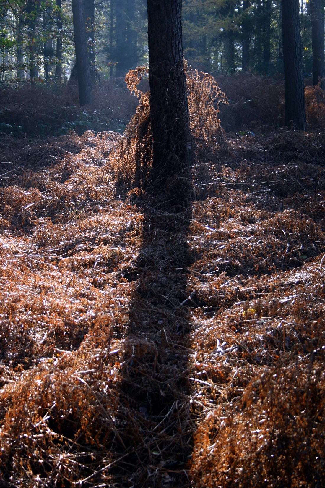 Eigen foto van varens in het bos in de herfst